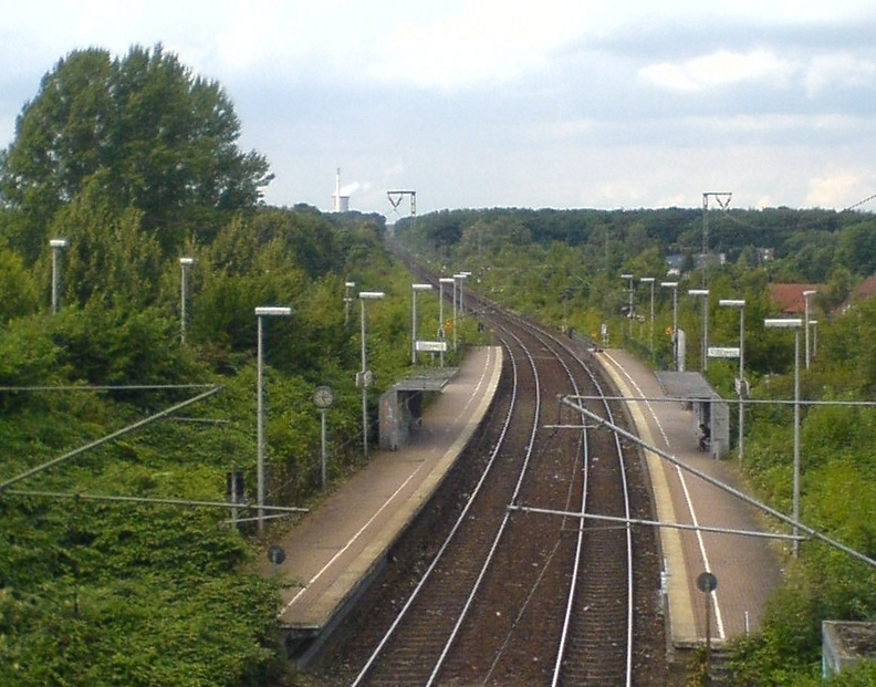 Bahnhof Dortmund-Huckarde